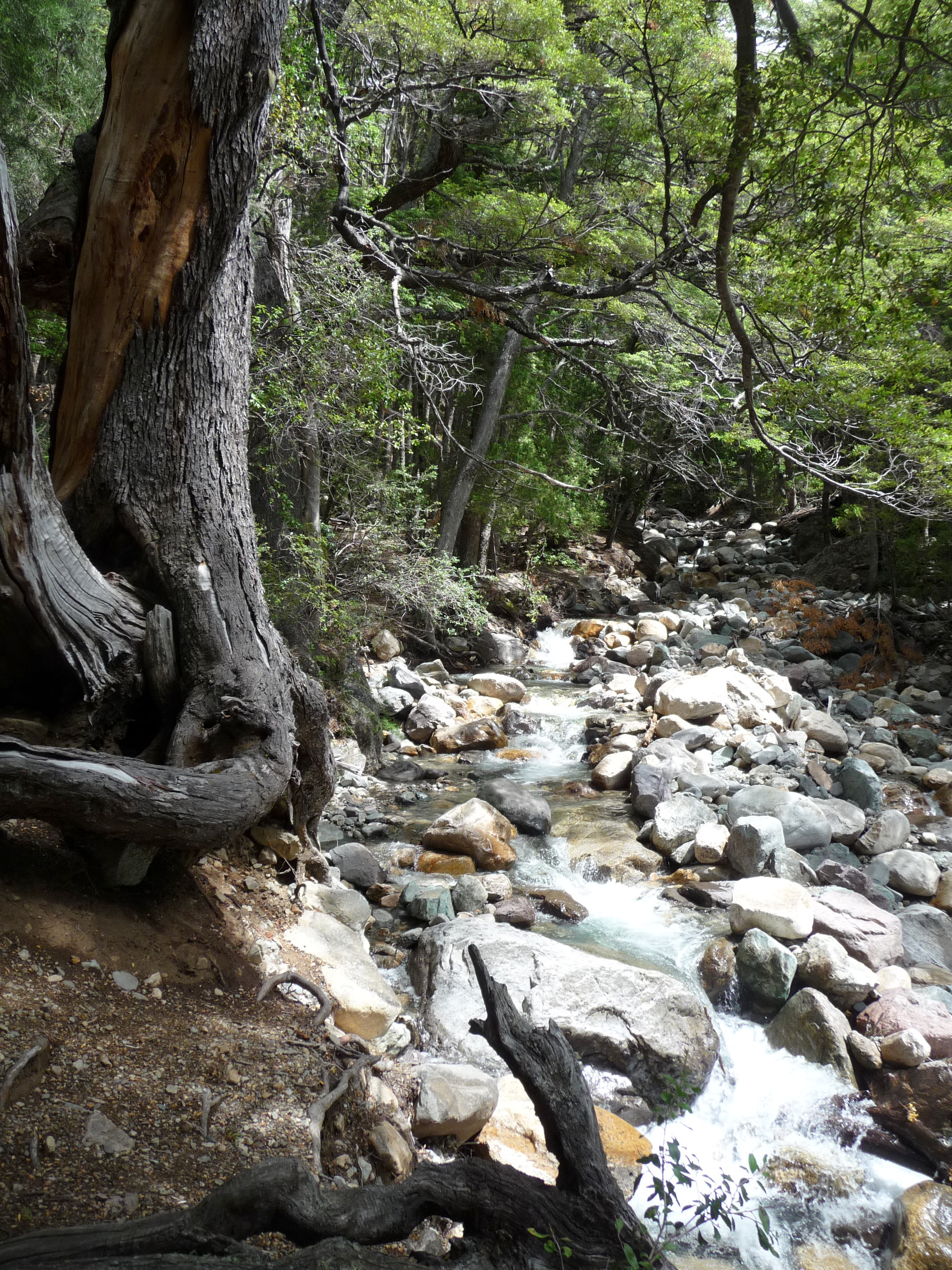 Arroyo López. Nace en el Cerro López y desemboca en el Lago Moreno Oeste (Bariloche, Argentina)